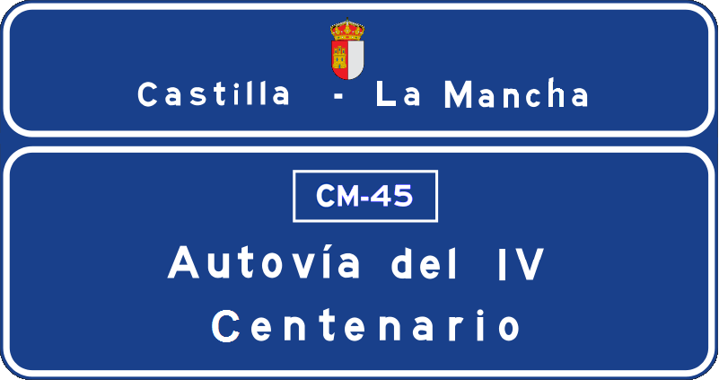 Logo de la Autovía del IV Centenario (CM-45)